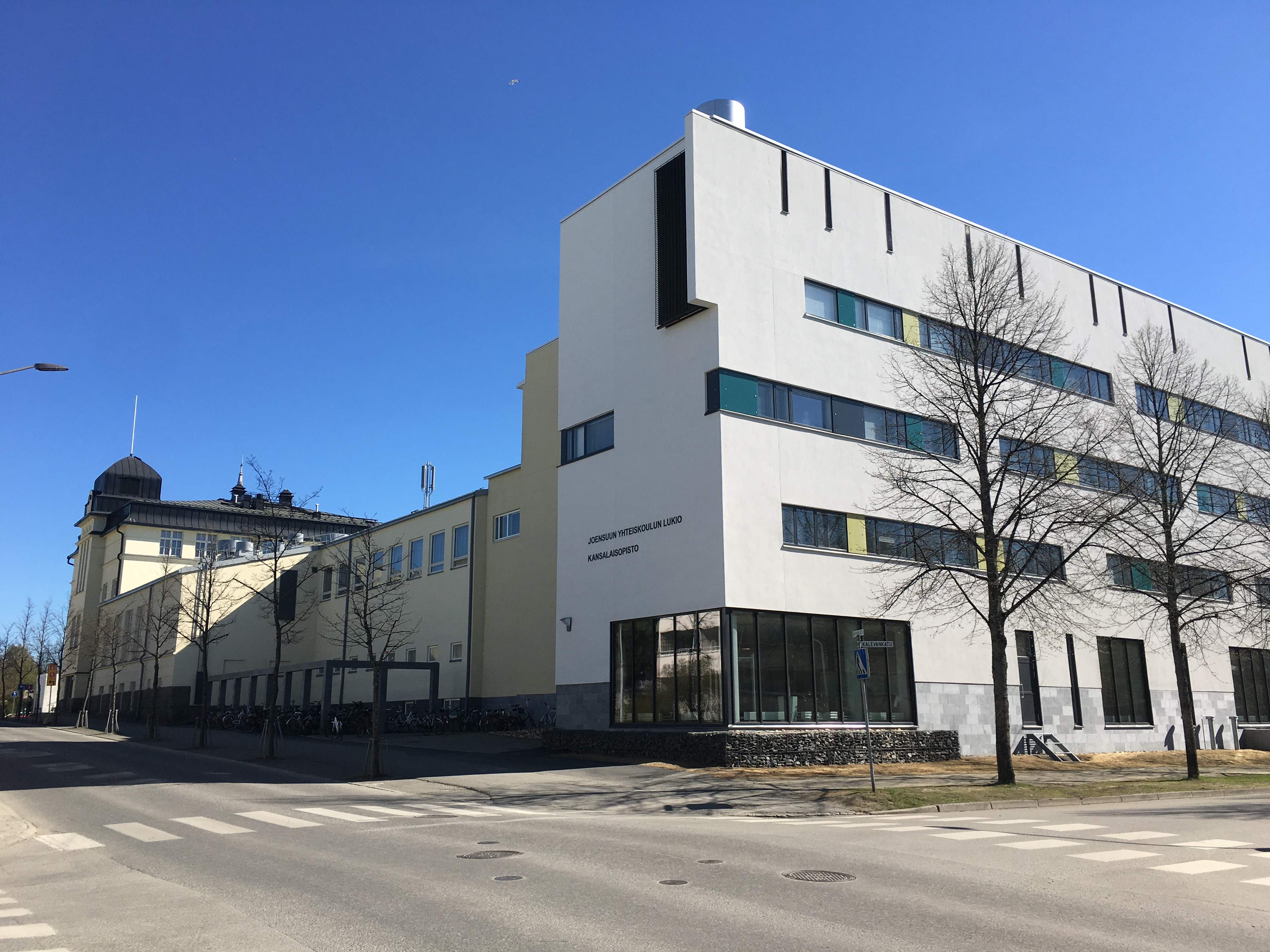 Toukokuussa 2015